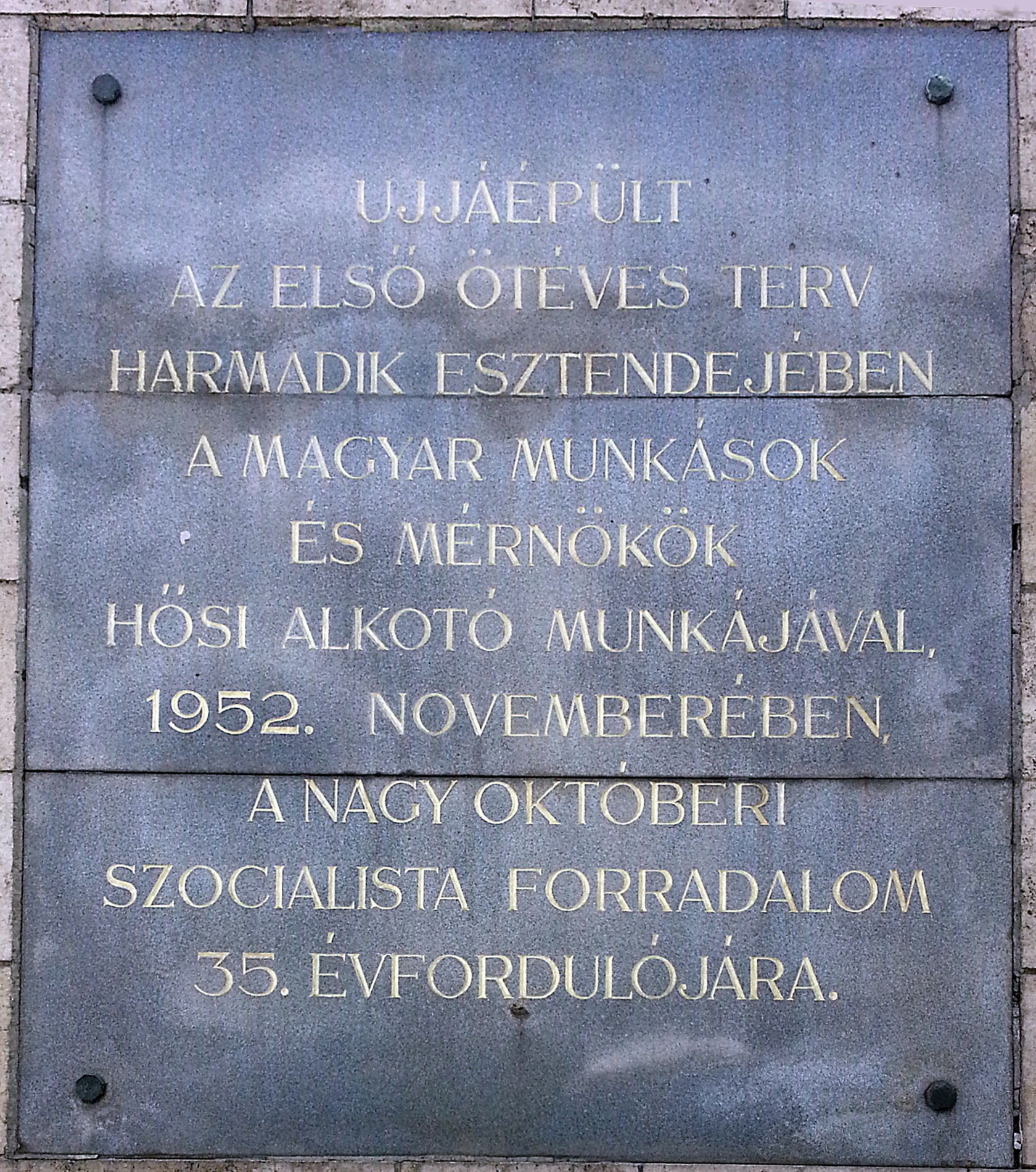 Petőfi híd újjáépítése emléktábla, Budapest XI. kerület, Budai hídfő, Goldmann György tér